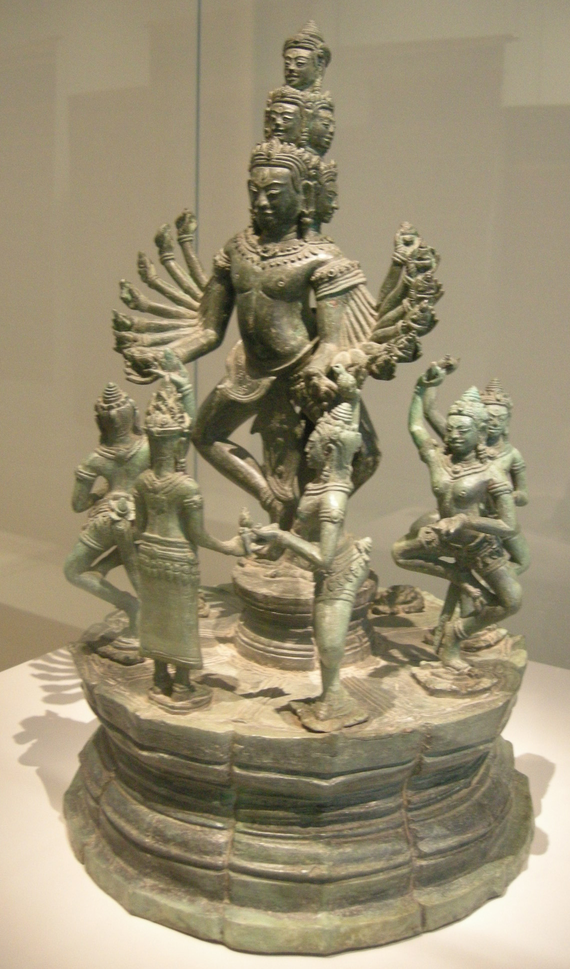 cambogia, hevajra mandala, XII-XIII sec